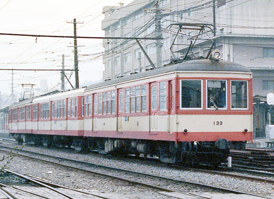 伊予鉄道 133